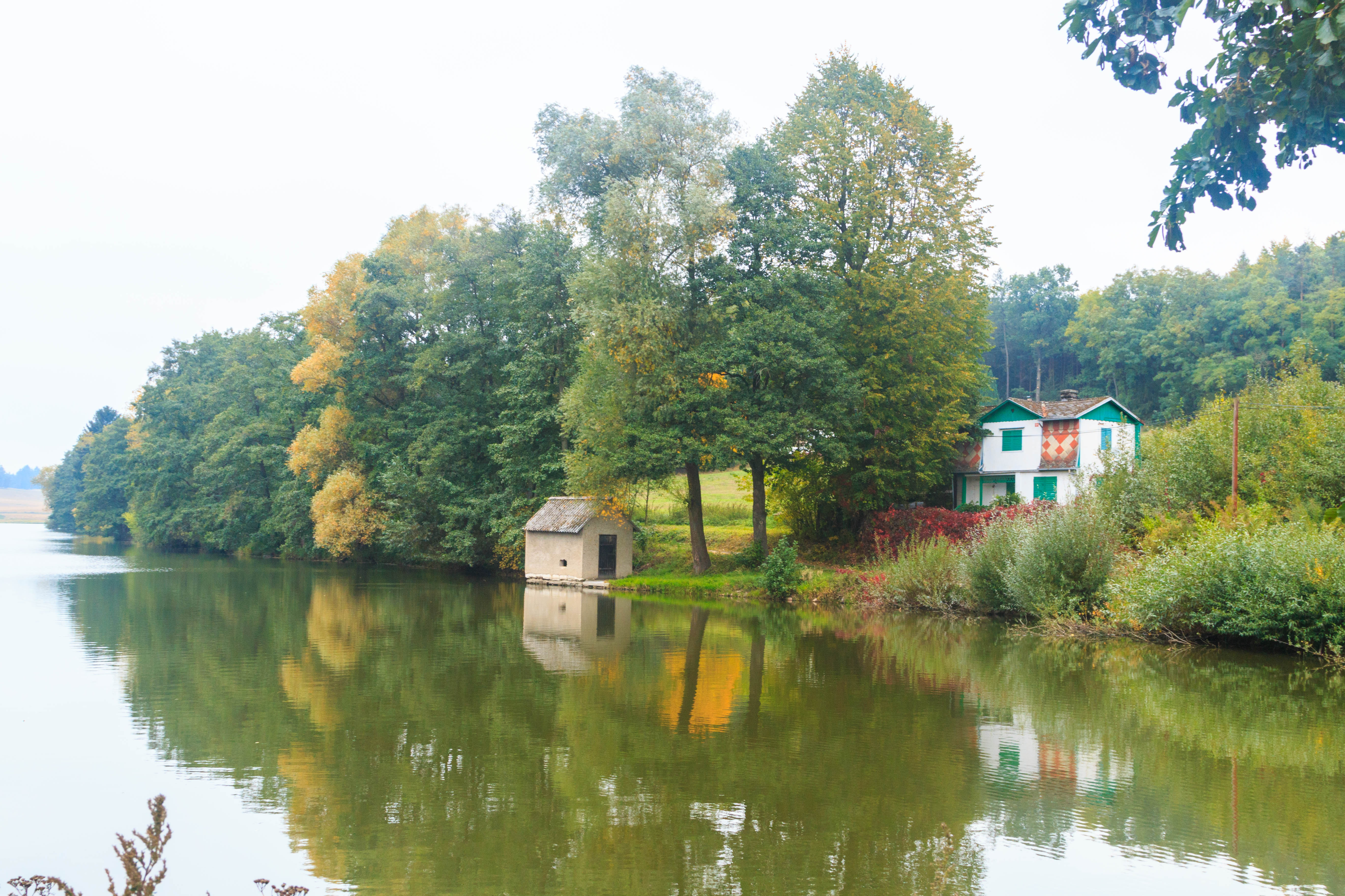 rybník Horní Zástava u Pilského mlýna